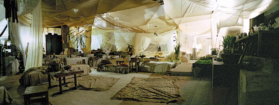 set design for Ainoa - finished set.